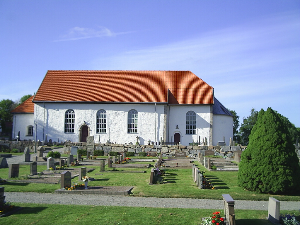 Skee församlings kyrka från 1100-talet. Fotograf:Tubaist